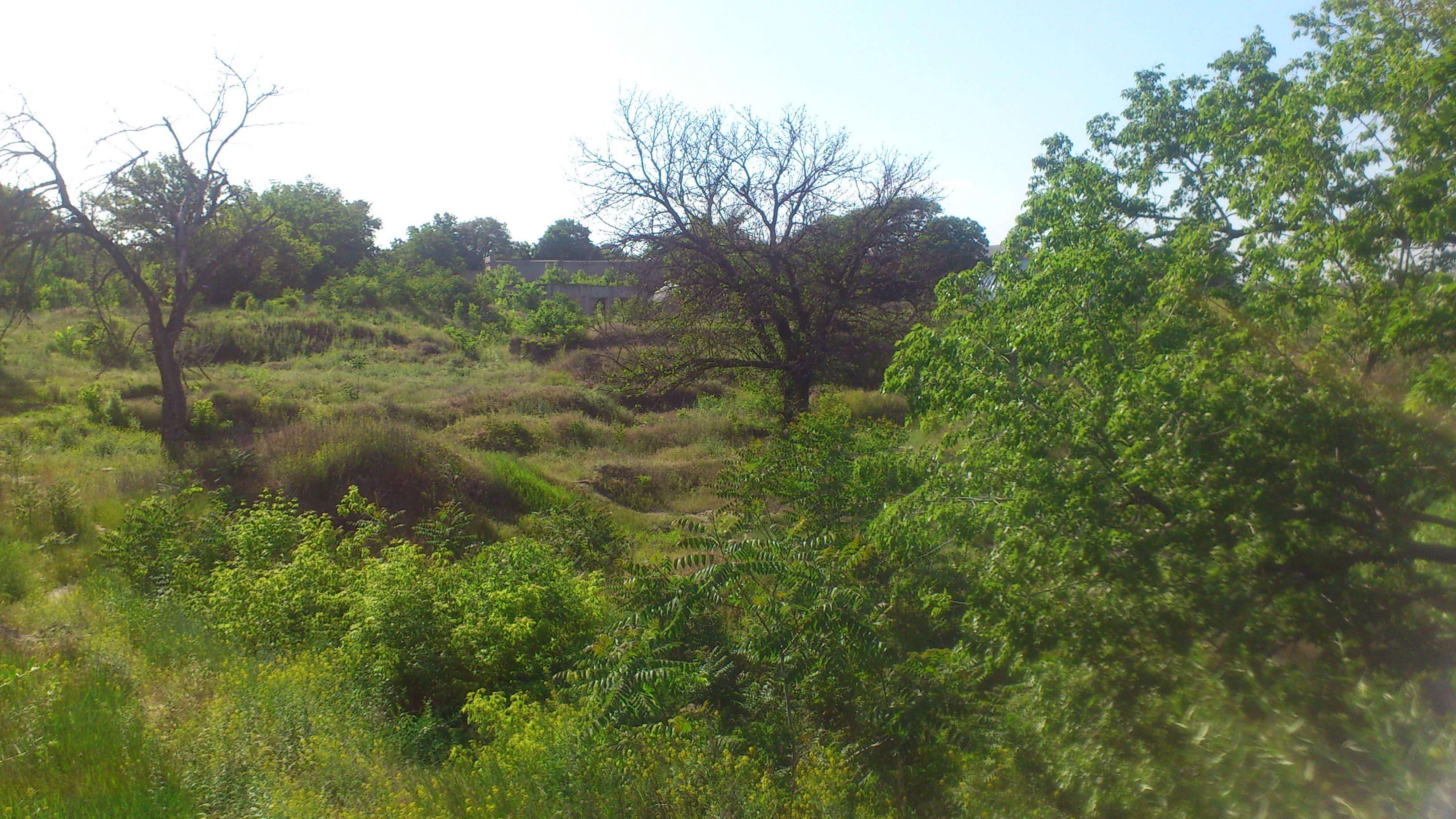 Дикий Сад, Миколаїв